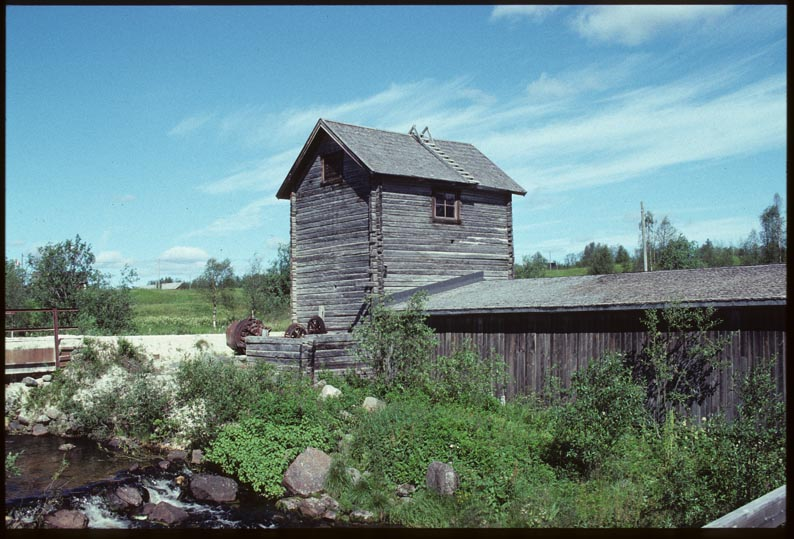 Jukkasjärvi 44:6. Gruvområde, bestående av ett gruvhål, skärpningar, skrotstenshögar och en vattenränna. Motiv: Jukkasjärvi 44:6 Kategori: Gruvområde Jukkasjärvi 44:6. Gruvområde, bestående av ett gruvhål, skärpningar, skrotstenshögar och en vattenränna. Jukkasjärvi 44:6.